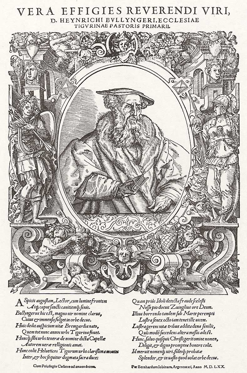 Tobias Stimmer: Porträt des Pastors Heinrich Bullinger. Holzschnitt 1570; 27 × 22 cm, Kupferstichkabinett Berlin